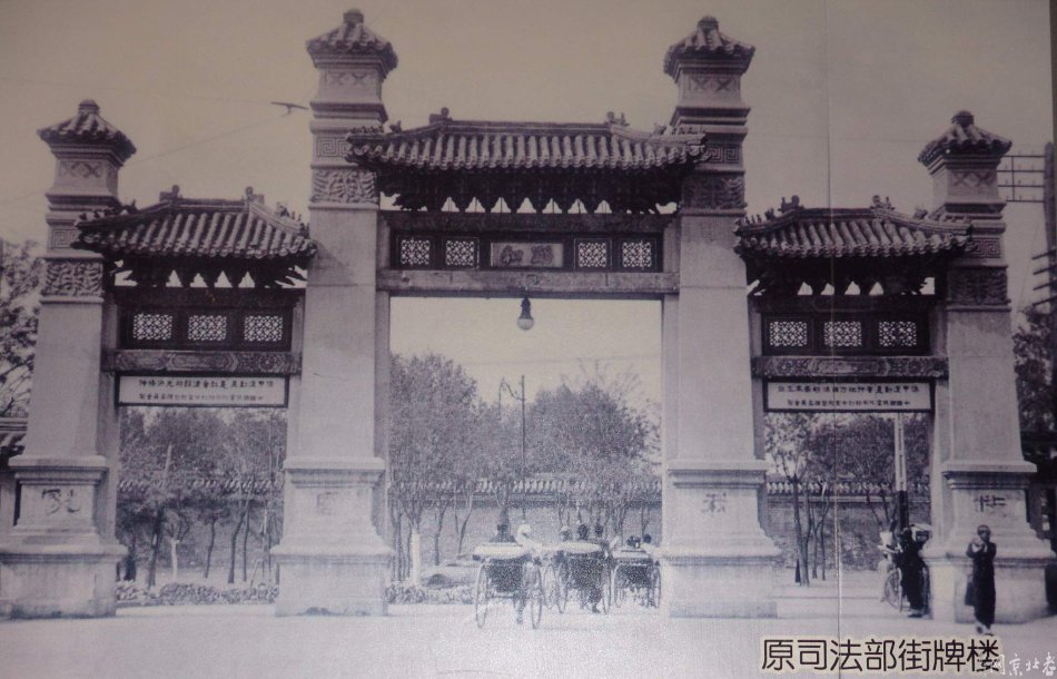 1930年前後，西公生门“蹈和”牌楼下的人力车（司法部街北口北向），长安右门外，可见皇城南墙。牌楼下部四柱上的标语是“救我國家”。